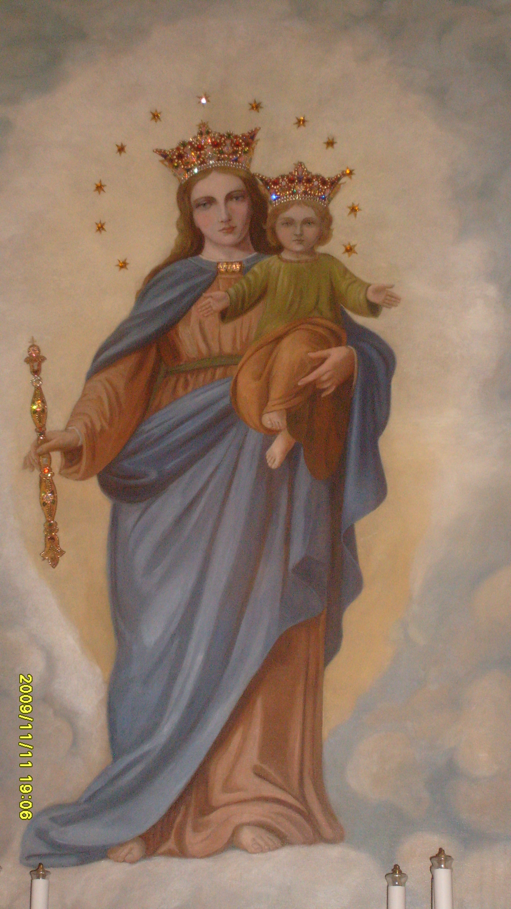 Łaskami słynacy obraz Matki Bożej Wspomożenia Wiernych (mal. Wanda Golzowska)